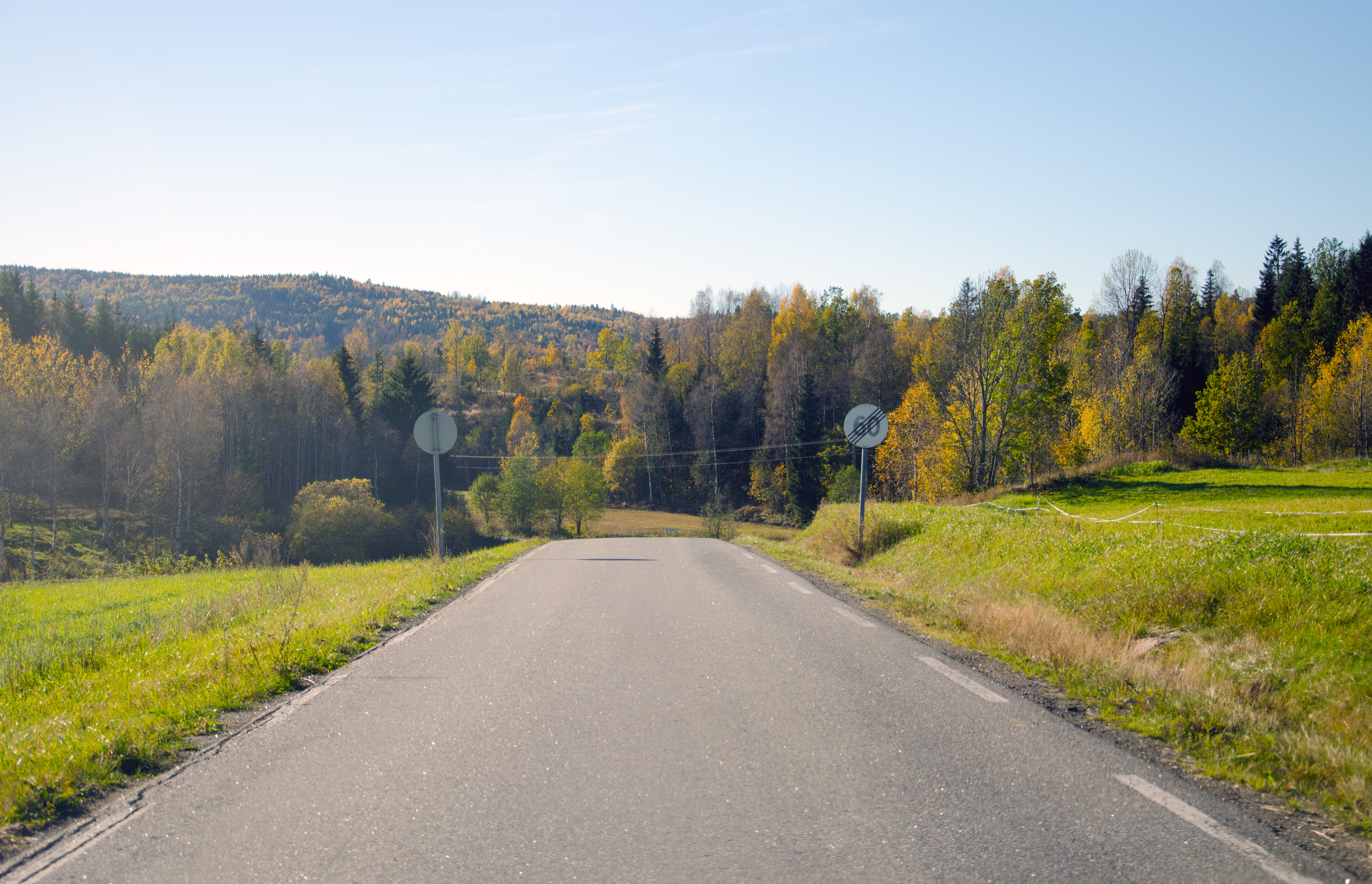 Fylkesvei 605 Daleneveien i Vestfold